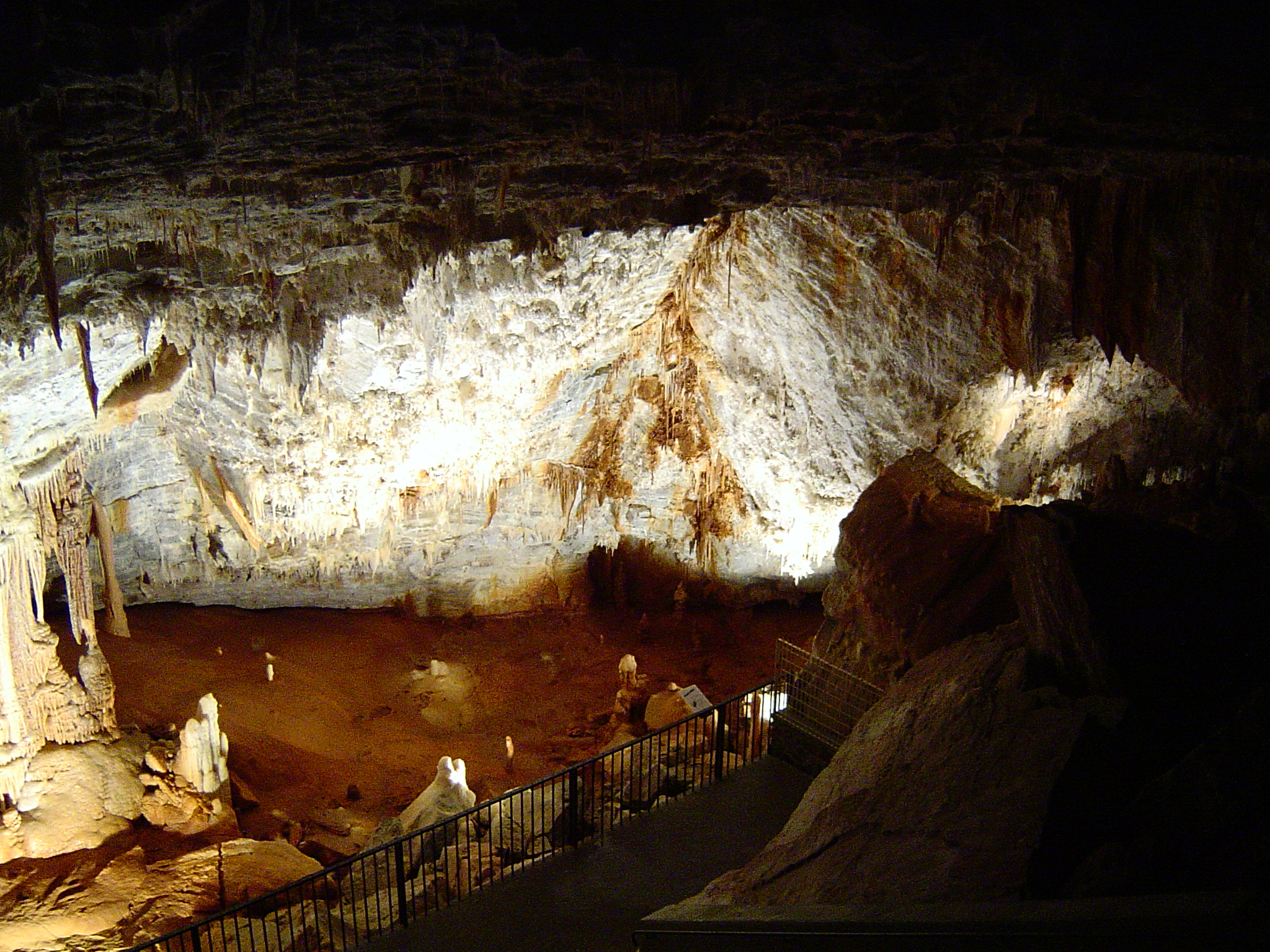 Vue sur le gouffre de Cabrespine (France, Aude, 11)